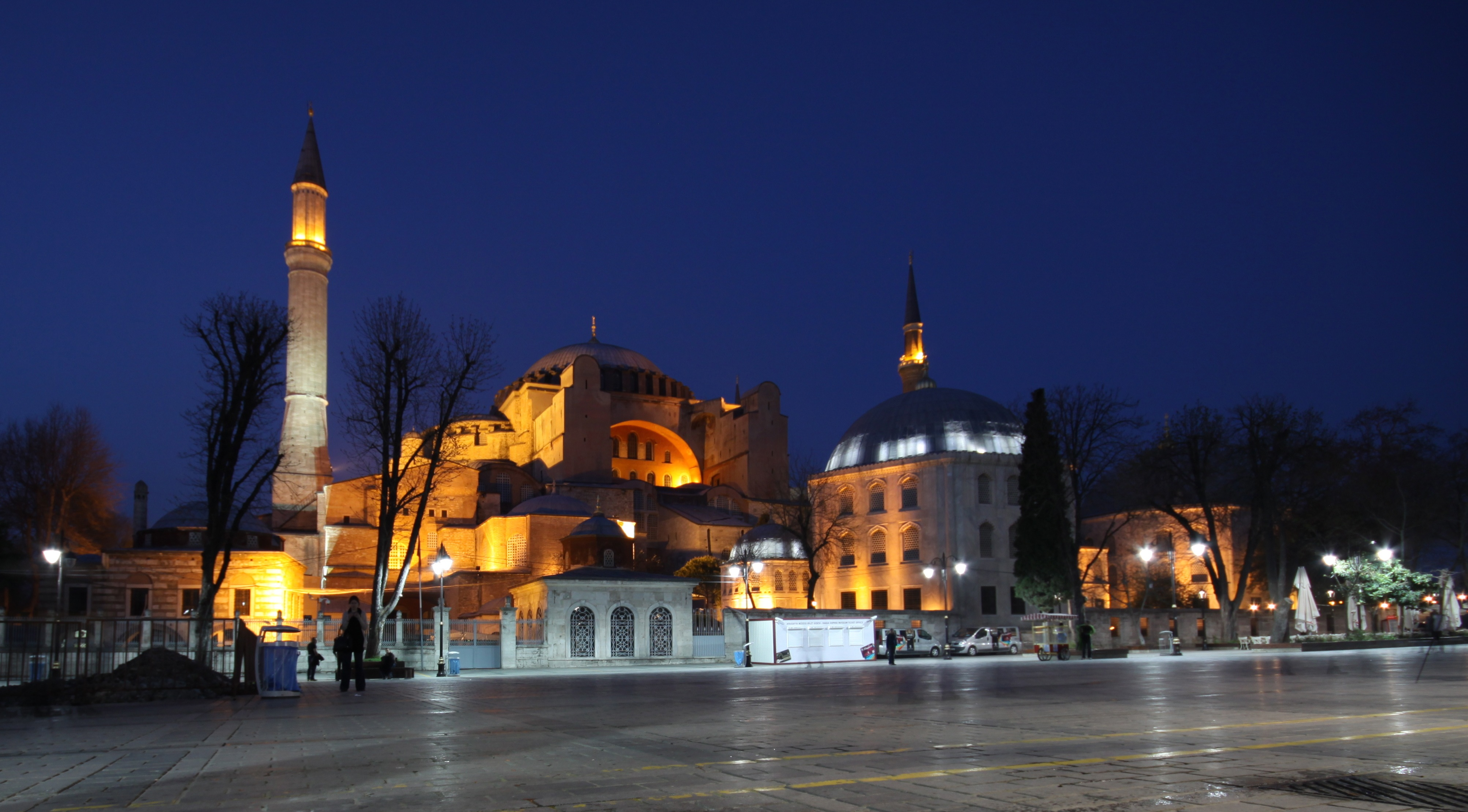 Die Hagia Sophia während der blauen Stunde